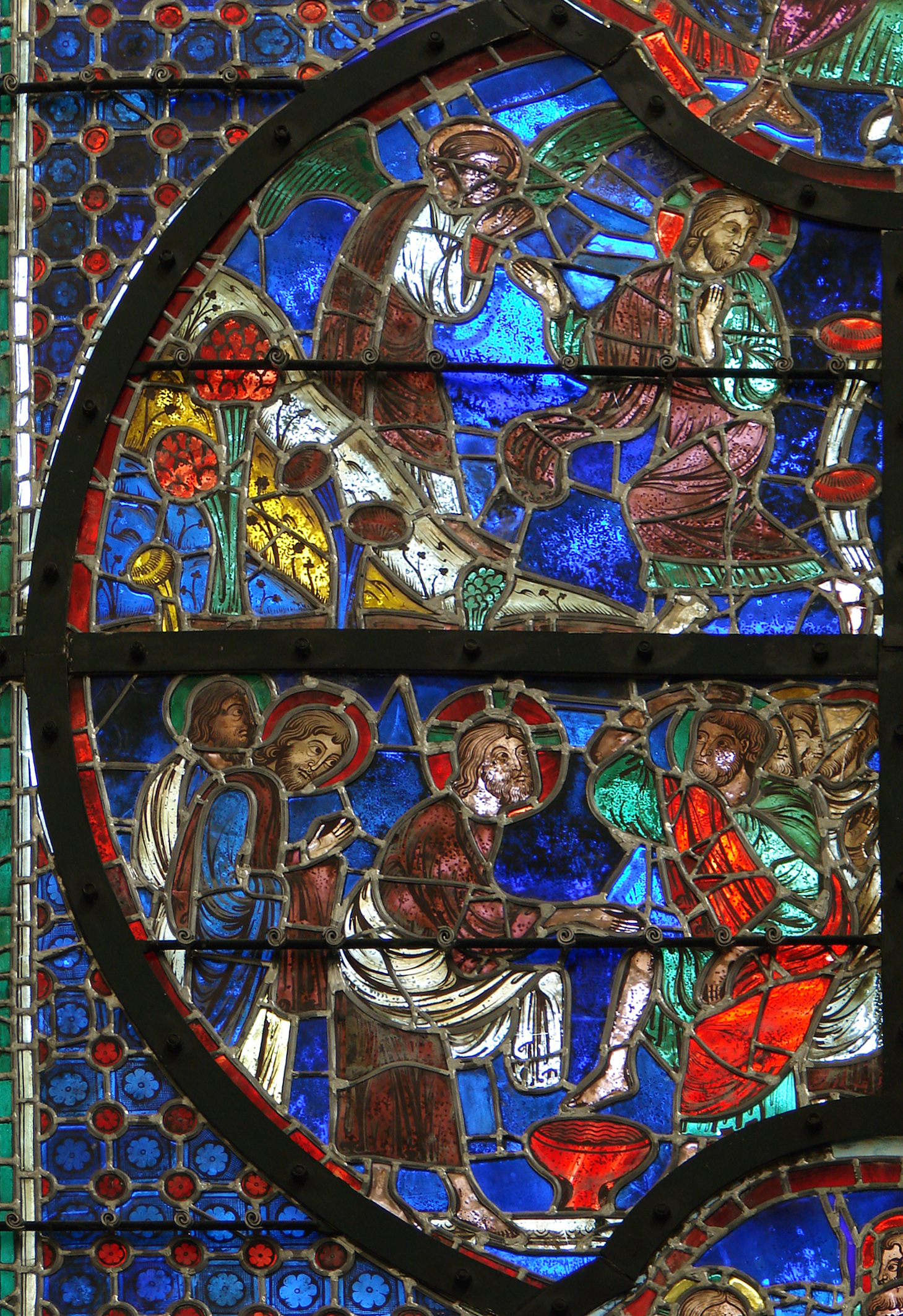 Baie centrale du choeur de la cathédrale Notre-Dame de Laon, vers 1215. Détail: en haut, Jésus au Jardin des Oliviers, en bas, le lavement des pieds.